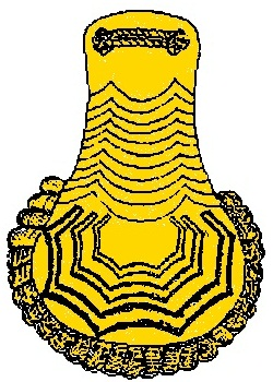 Spallina metallica da colonnello del Regio Esercito Italiano - Regno d'Italia